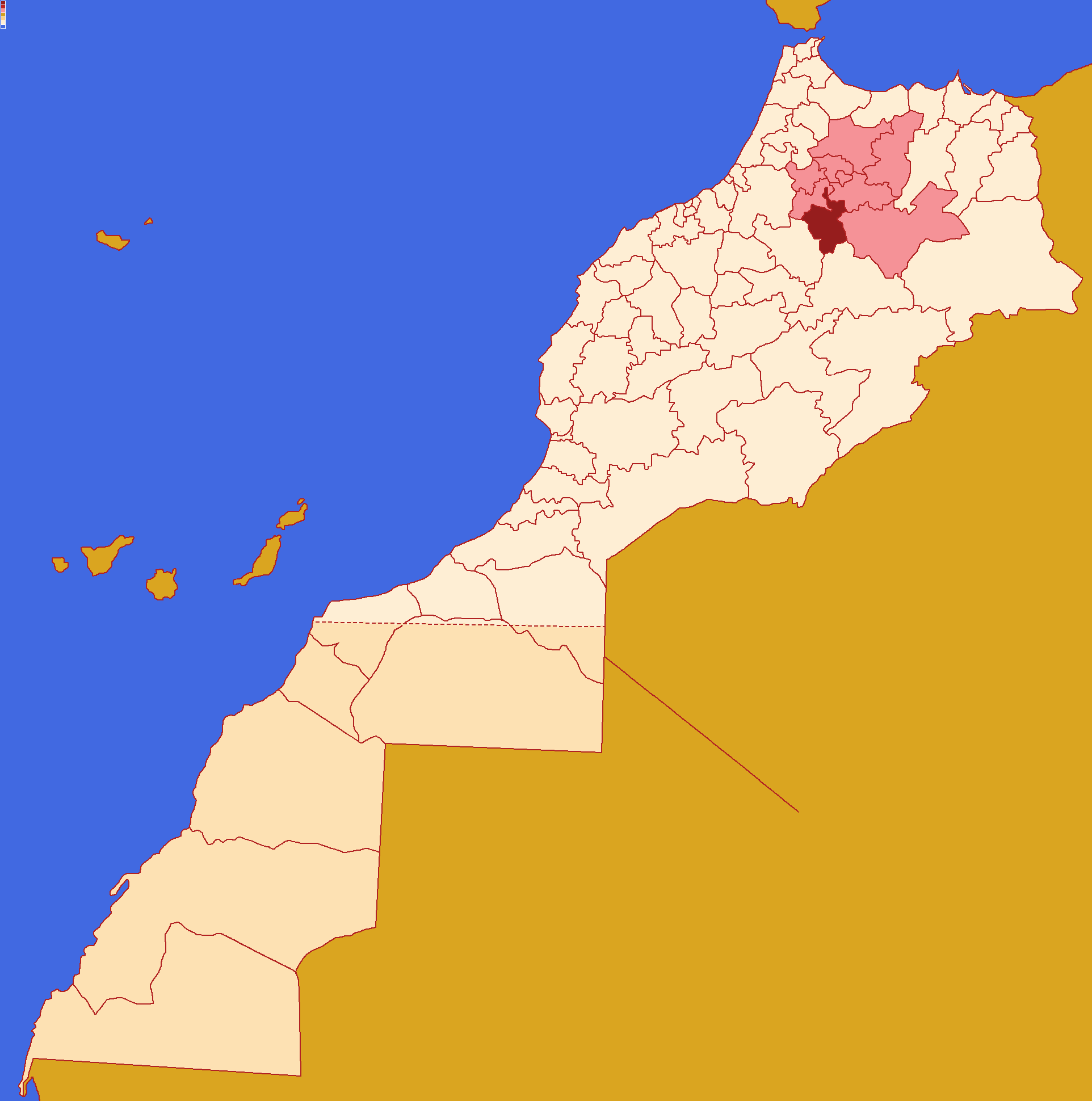 Localização da província de Ifrane ,dentro da região de Fez-Meknès e dentro de Marrocos.Conforme a reforma administrativa de 2015.